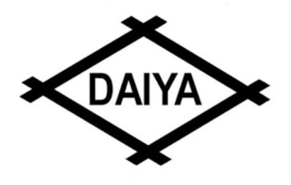 Logo des Blechspielwarenherstellers Daiya